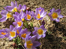 پیشوک یا زعفران جوقاسم 02